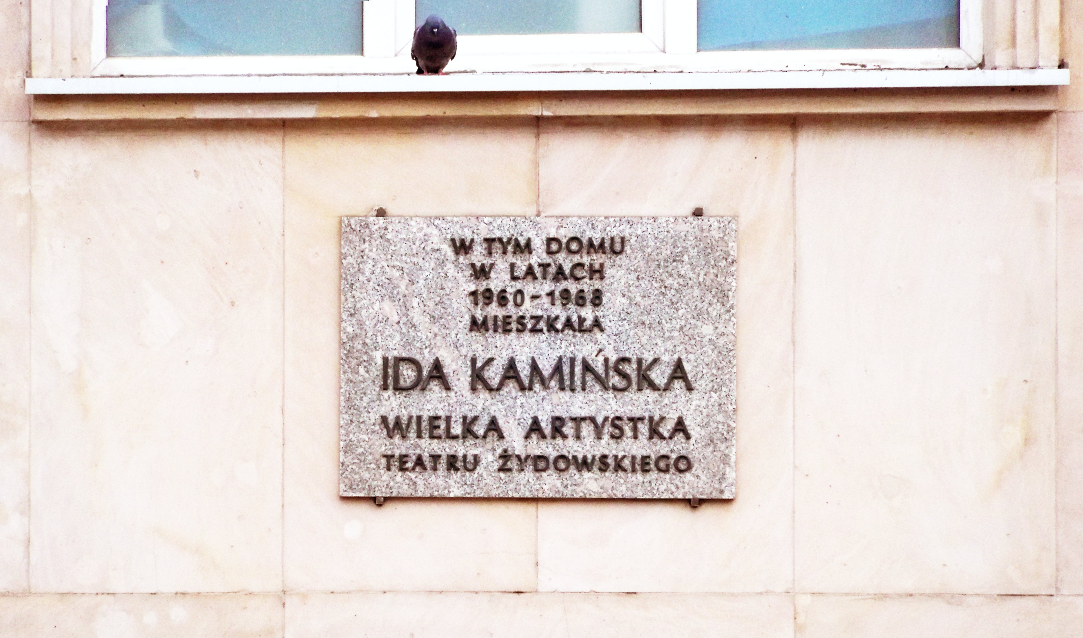 Kamienica Gustawa Pala w Warszawie.